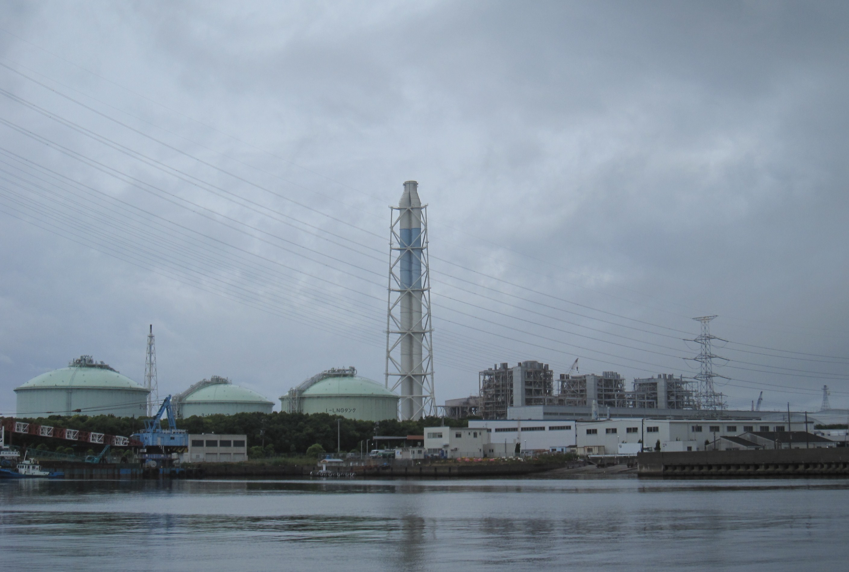 関西電力姫路第二発電所